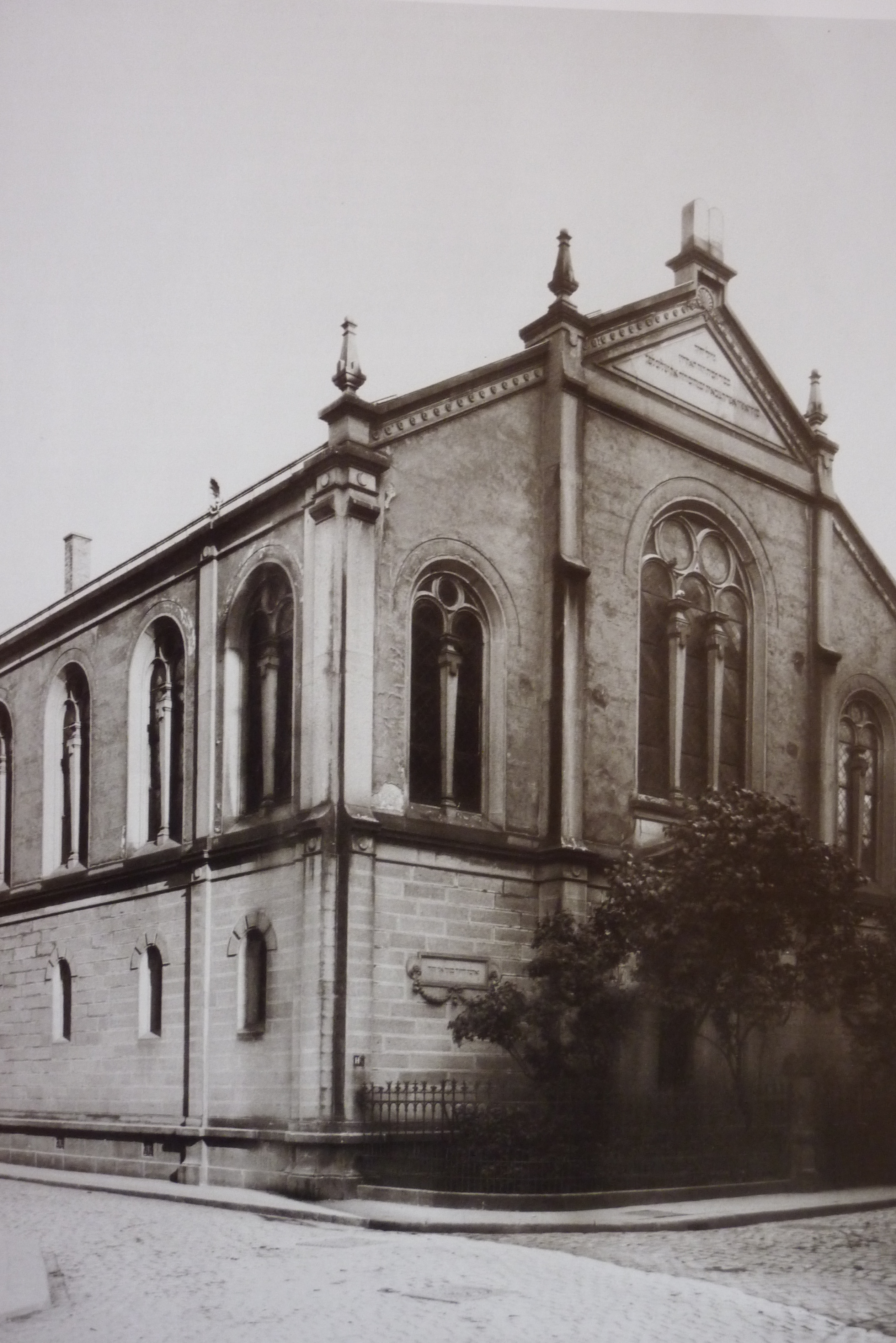 Synagoge in Heidelberg, erbaut 1878, Architekt: Hermann Behagel, zerstört 1938